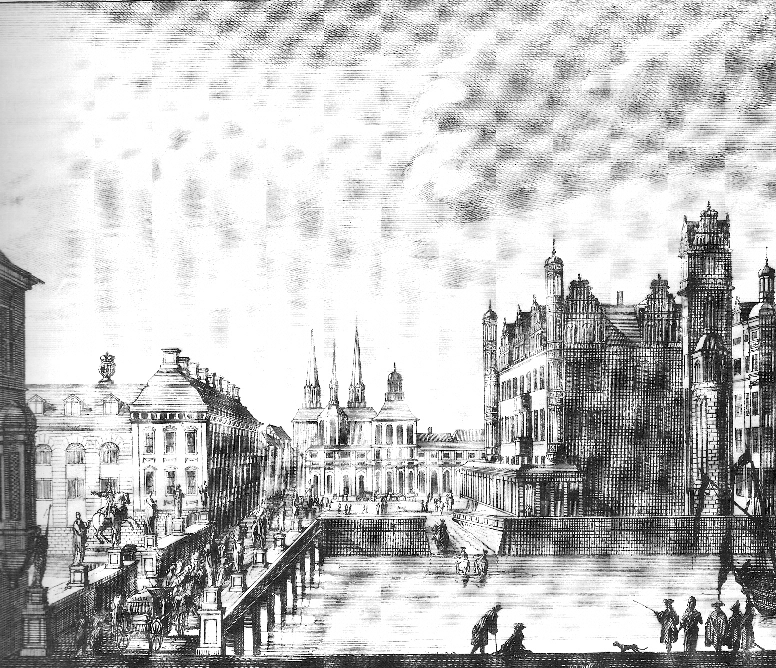 Ansicht des Berliner Schlossplatzes mit der alten Domkirche und dem Schloss (gesehen von Osten).